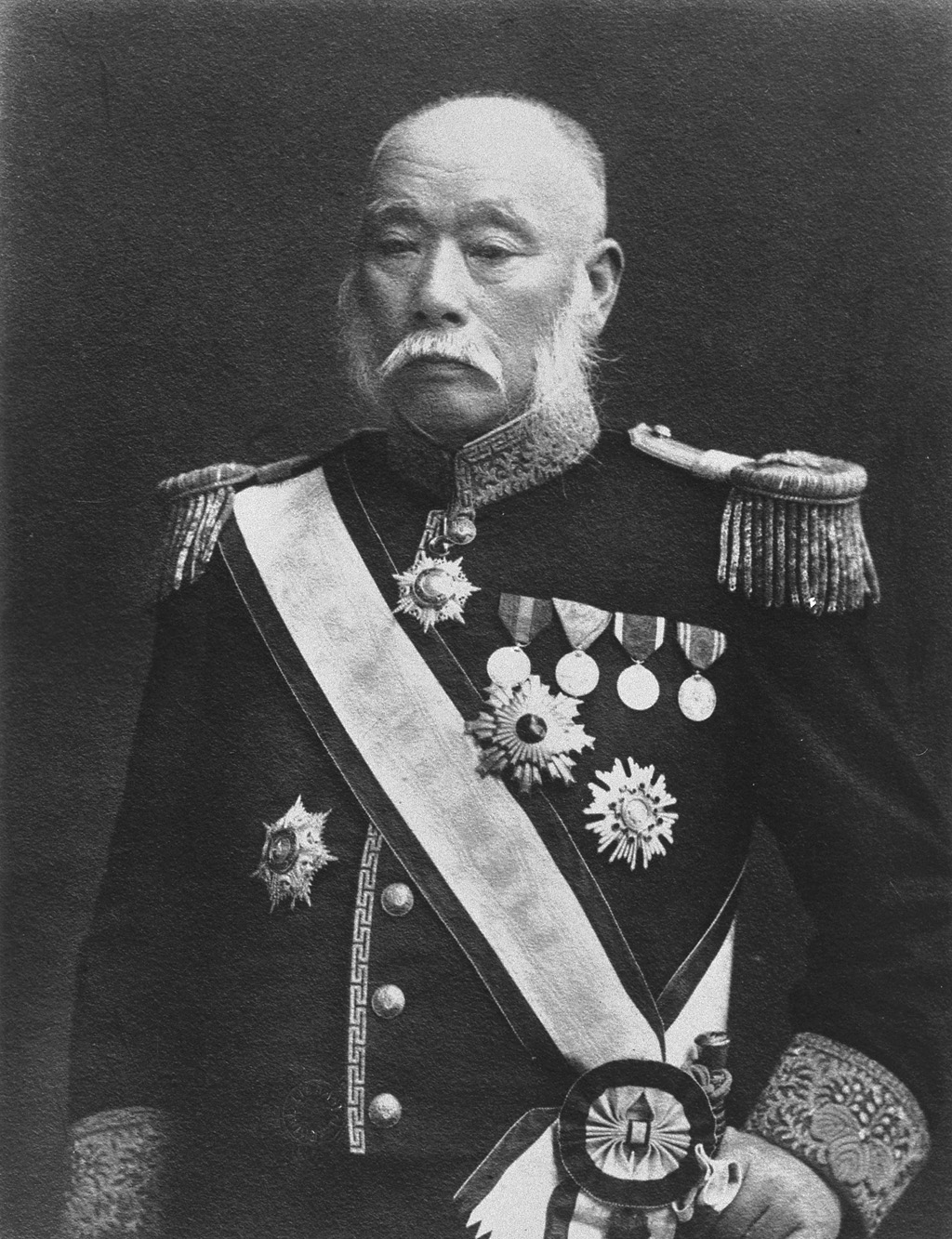 Portrait of Takasaki Masakaze (高崎正風, 1836 – 1912)